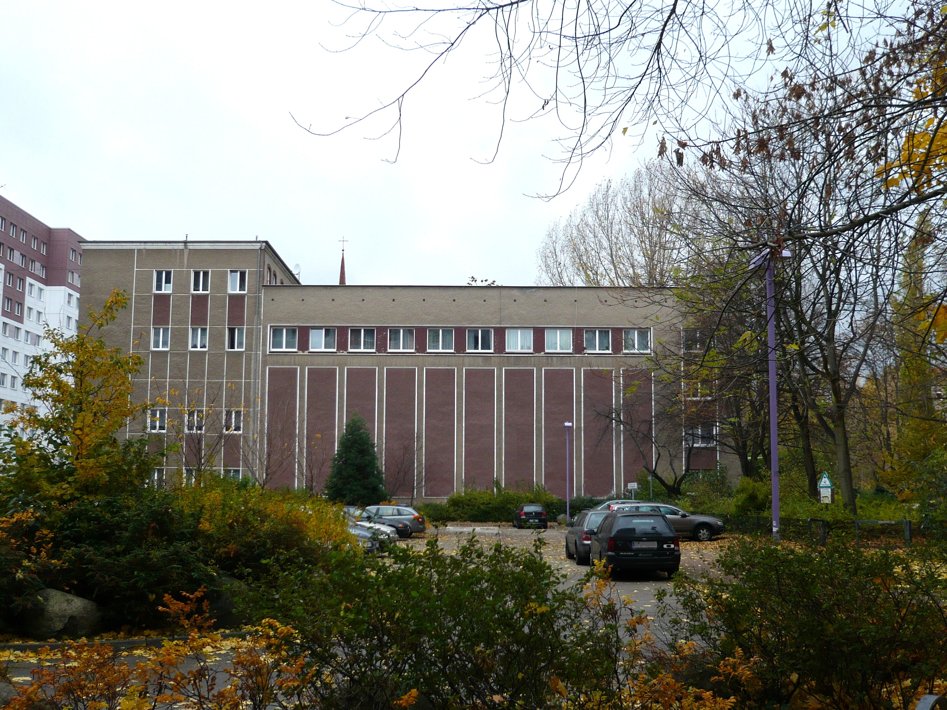 Straße im Ortsteil Berlin-Friedrichshain/ Rüdersdorfer Straße : St. Antonius kath. Kirche